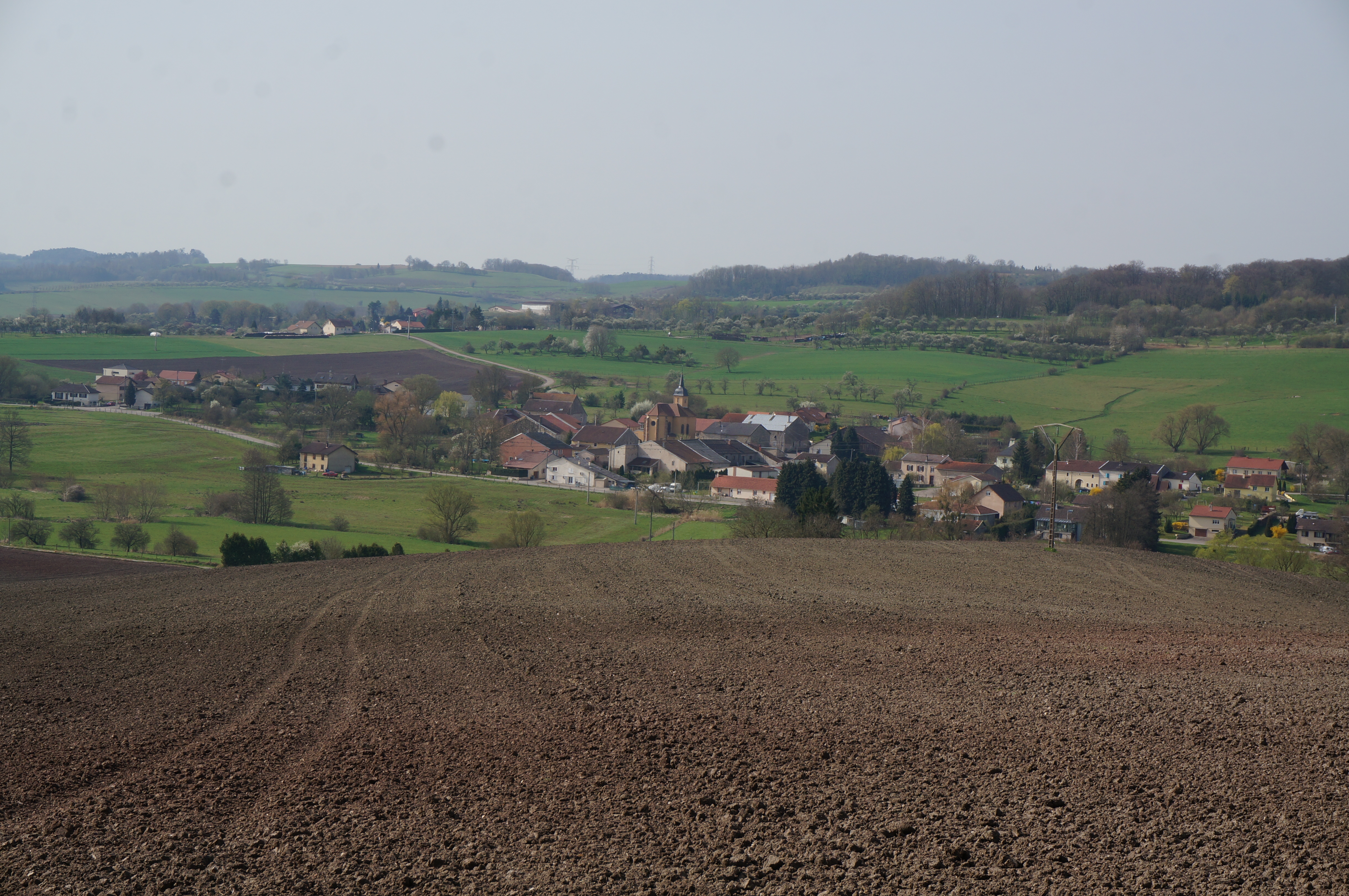 Cf titre.